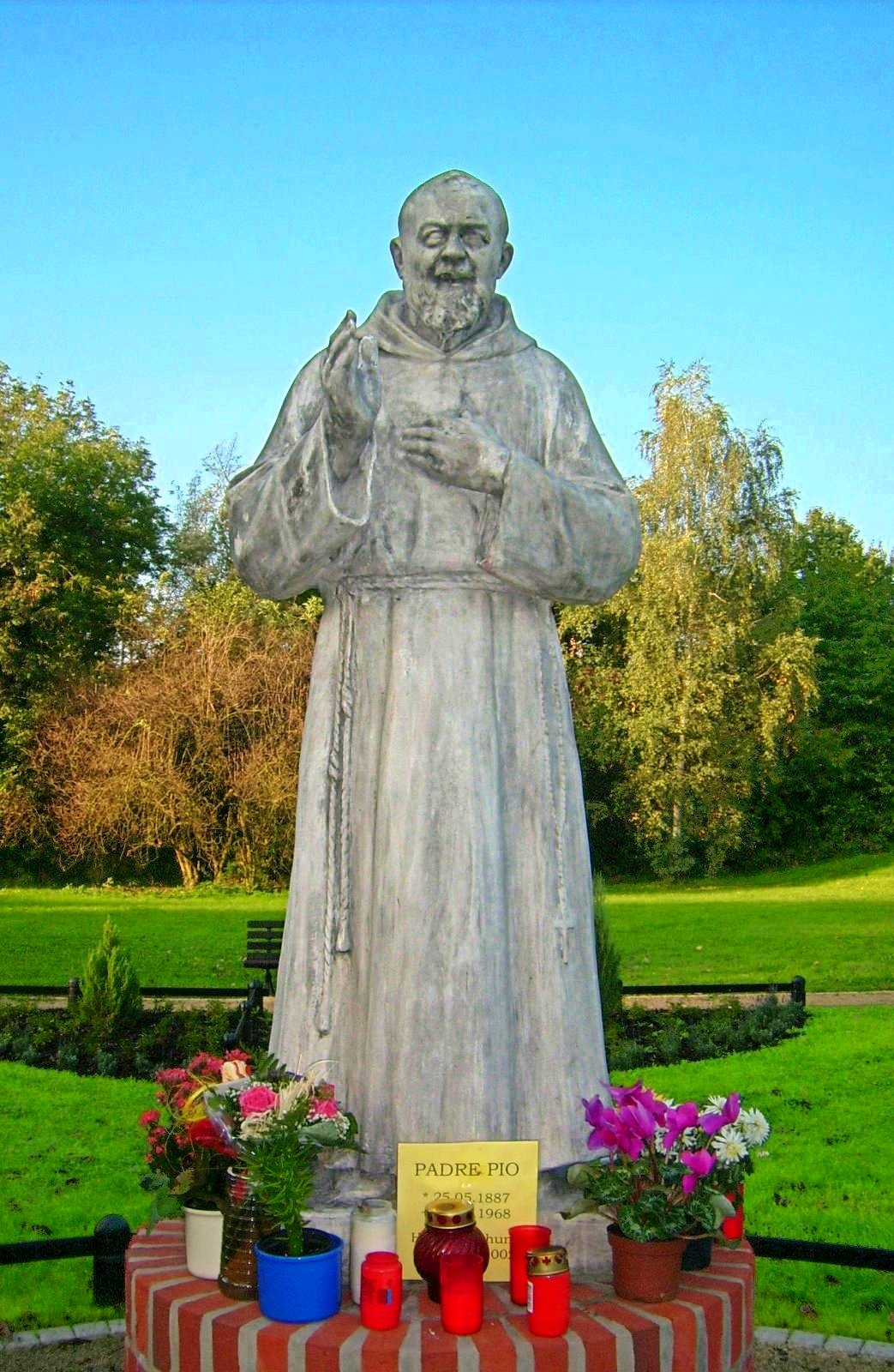 Padre Pio Statue in Dillingen, errichtet 2006